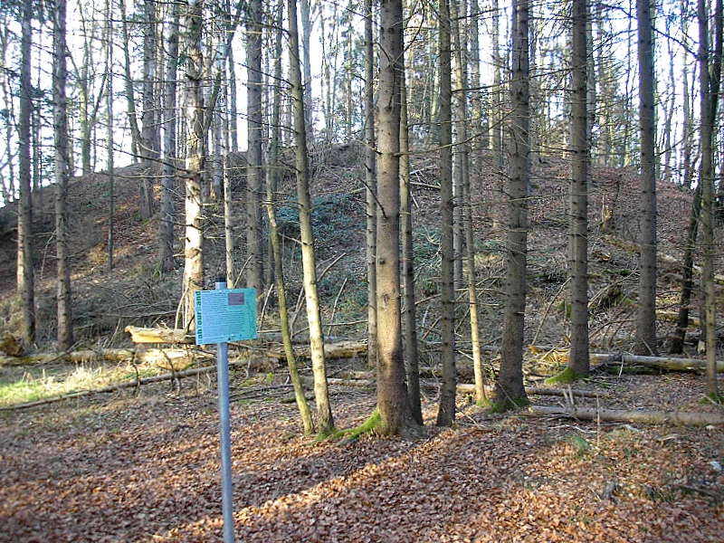 Sunderburg bei Schöngeising (Landkreis Fürstenfeldbruck, Oberbayern). Die Hauptburg von Süden. Eigene Aufnahme, Jan. 2008 / Sunderburg castle near Schoengeising (Landkreis Fuerstenfeldbruck, Upper Bavaria, Germany). The central castle. View from the south. Own photo, Jan. 2008